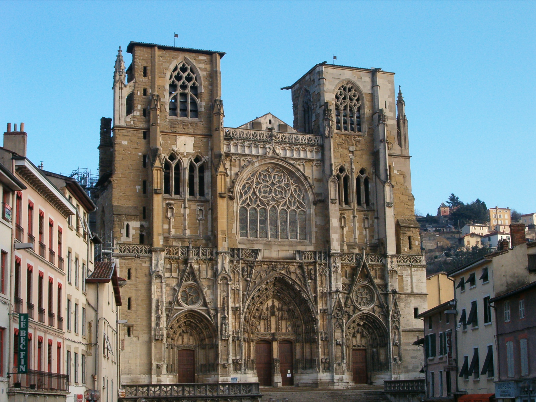 Façade de la Cathédrale Saint-Maurice de Vienne. Janvier 2007.